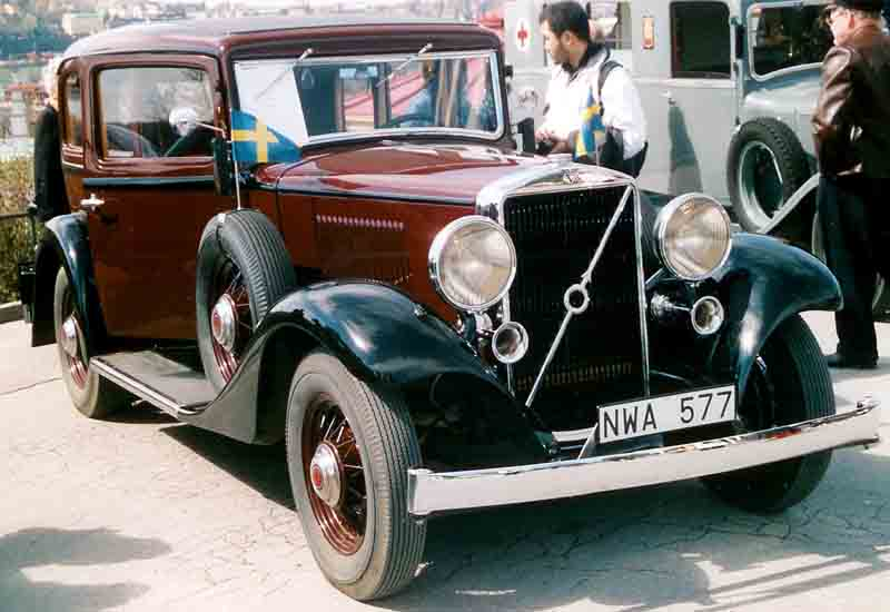 Volvo PV654 4-Door Sedan 1933